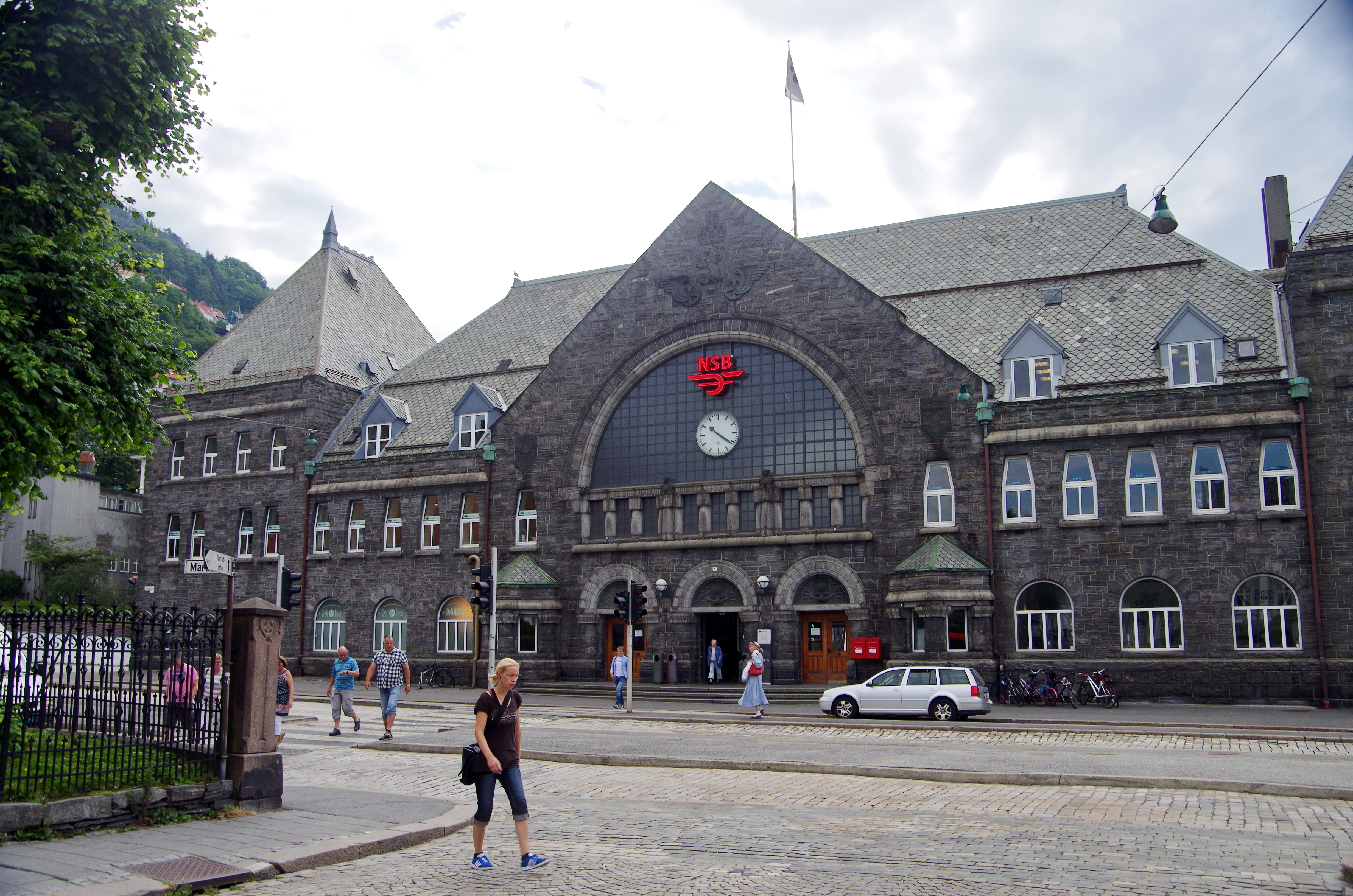 Bahnhof Bergen, Vorderfront